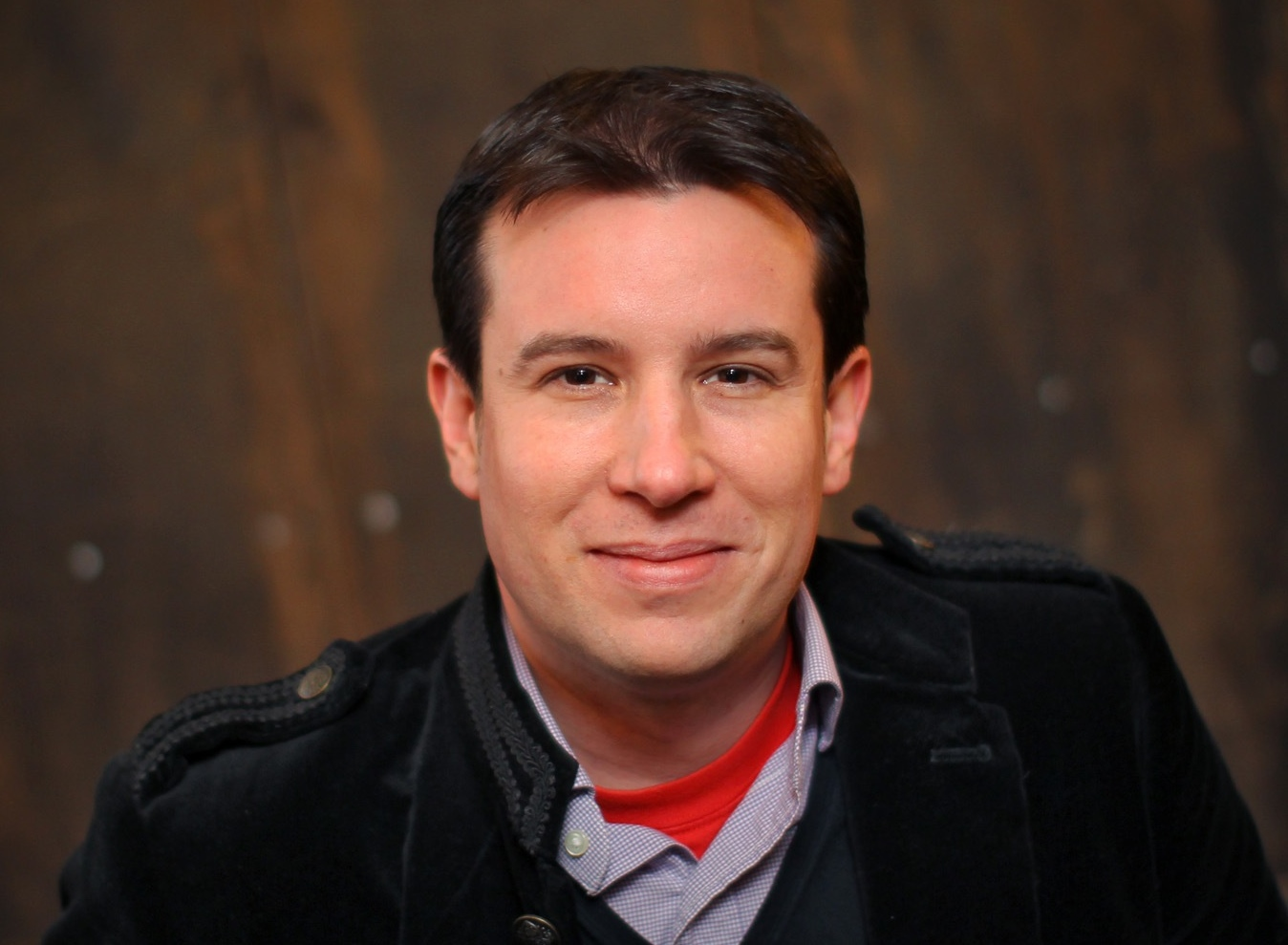 Profilbild